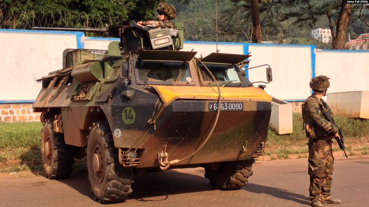 Les soldats français en position à Bangui, République Centrafricaine. Décembre 22, 2013